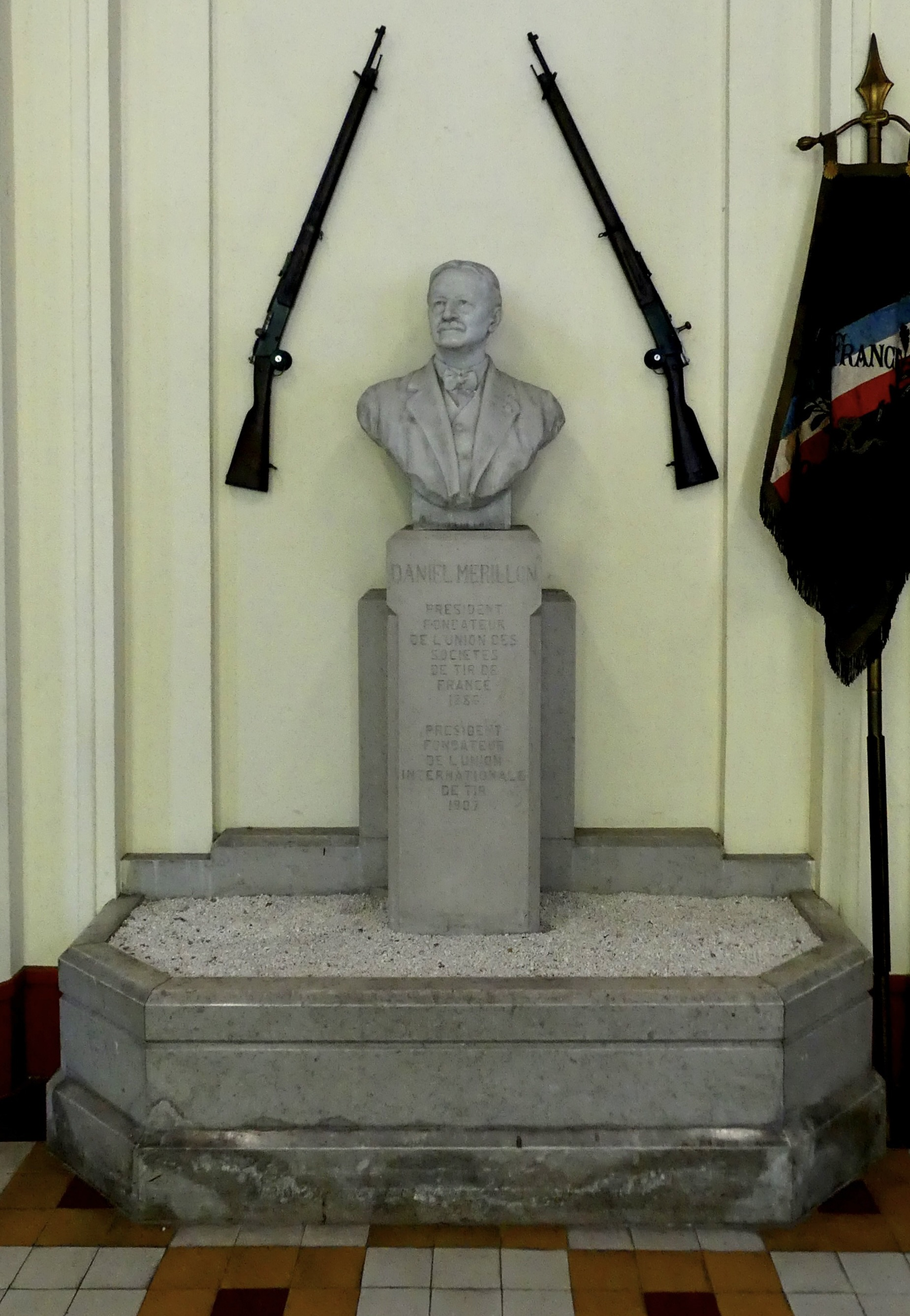 Le monument à la mémoire de Daniel Mérillon édifie dans la salle d'honneur du Tir National de Versailles, inauguré en aout 1928